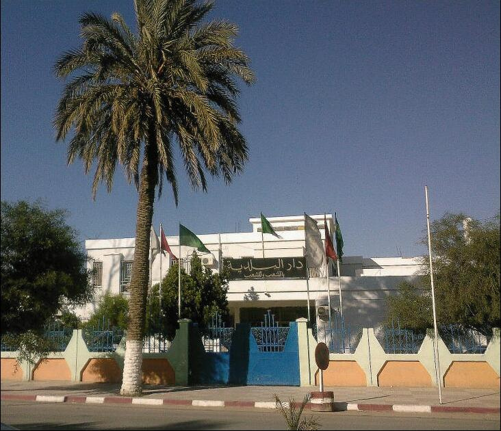 APC de Barika